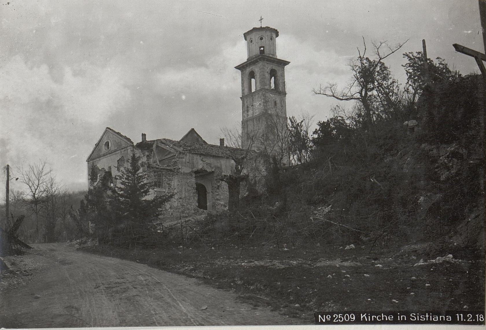 Kirche in Sistiana 11.2.18.